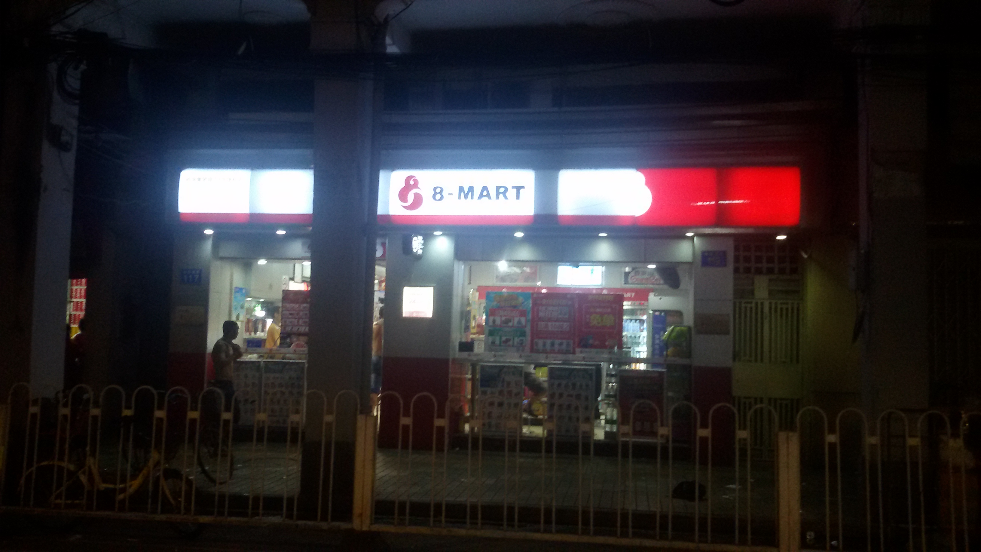 粵語: 喺廣州越秀區海珠南路嘅8字便利舖